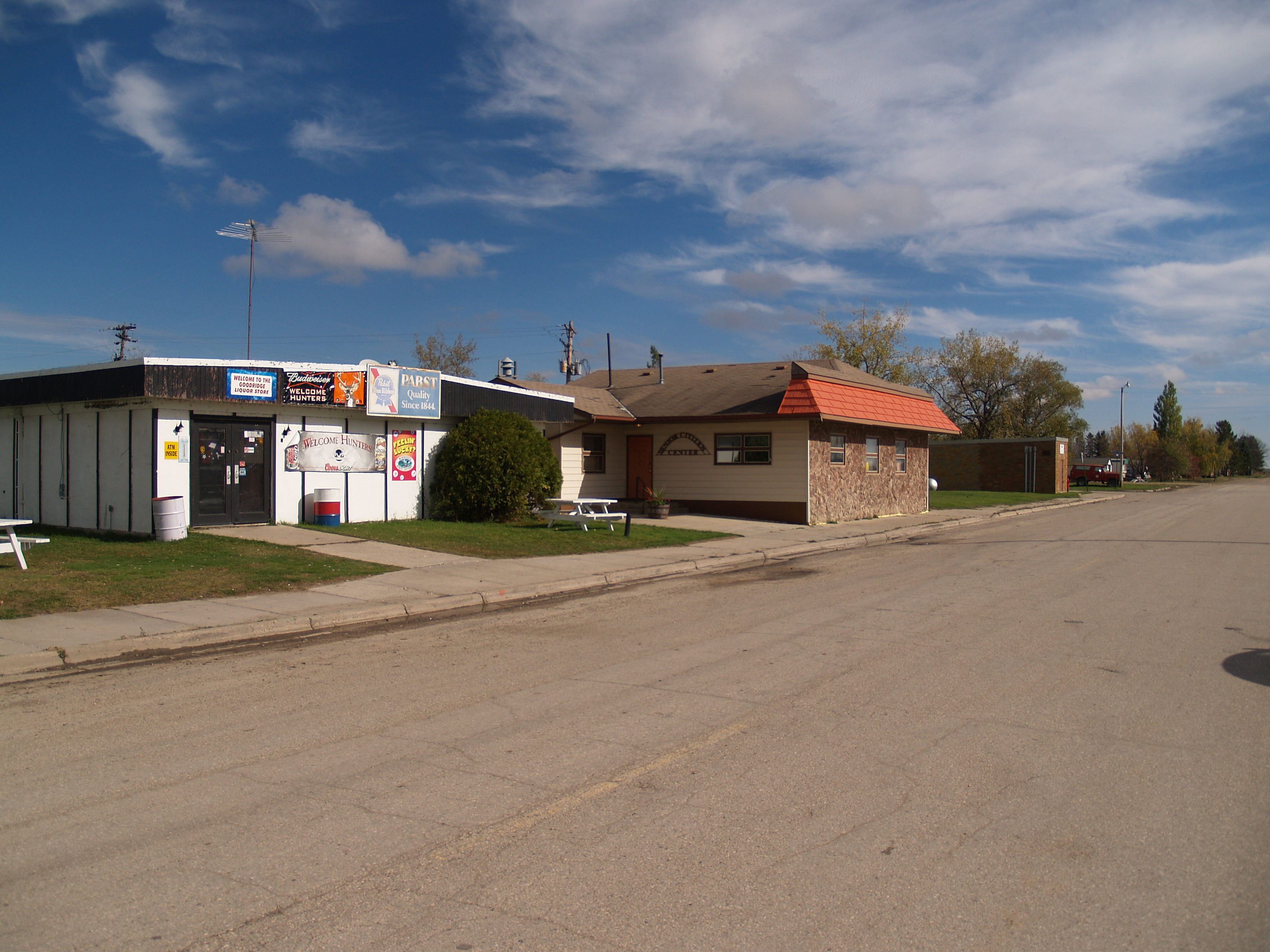 Goodridge, Minnesota